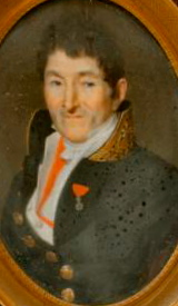 Augustin-Charles-Alexandre Ollivier (1772-1831)